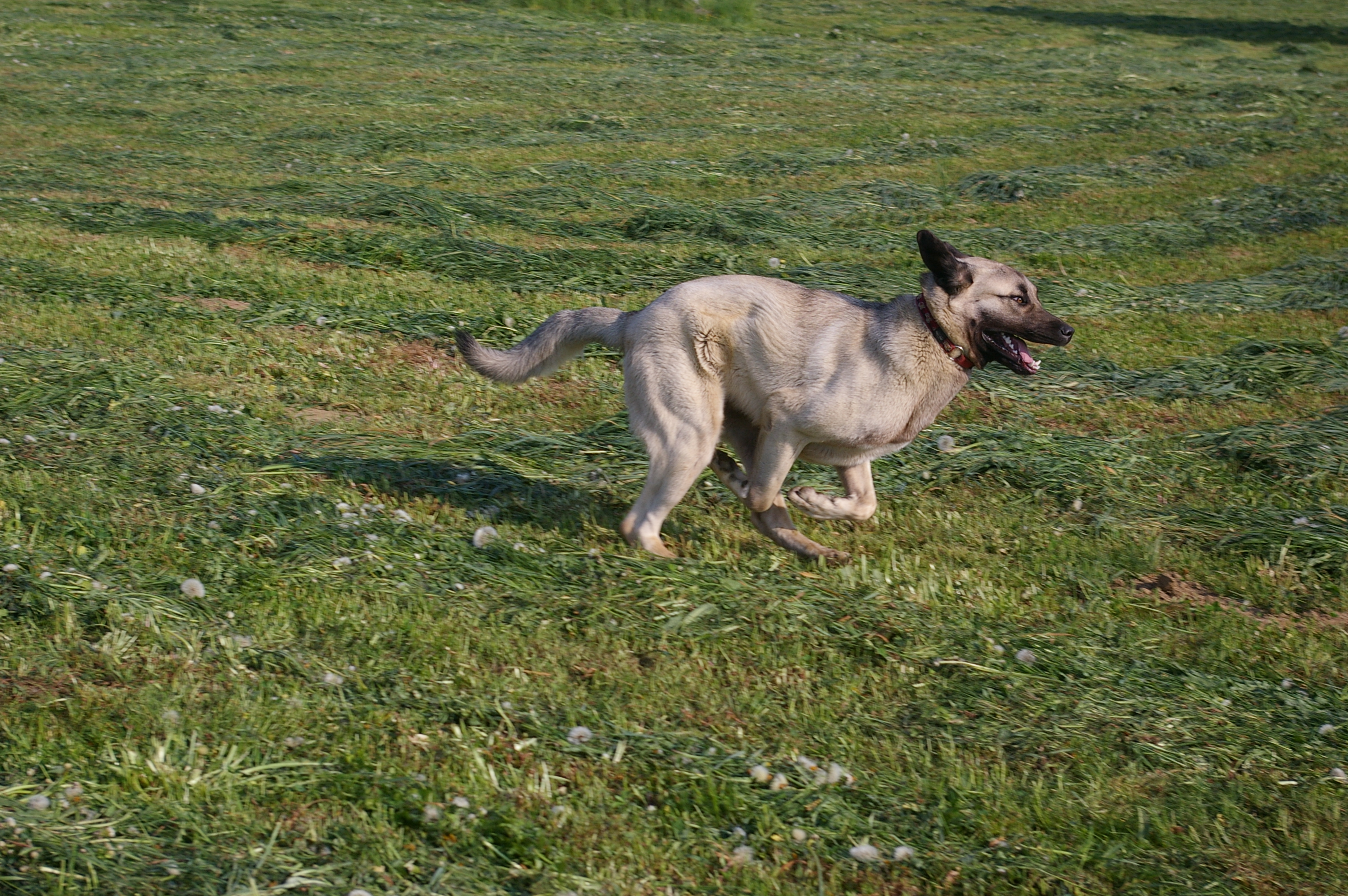 Anatolski ovčar v teku.